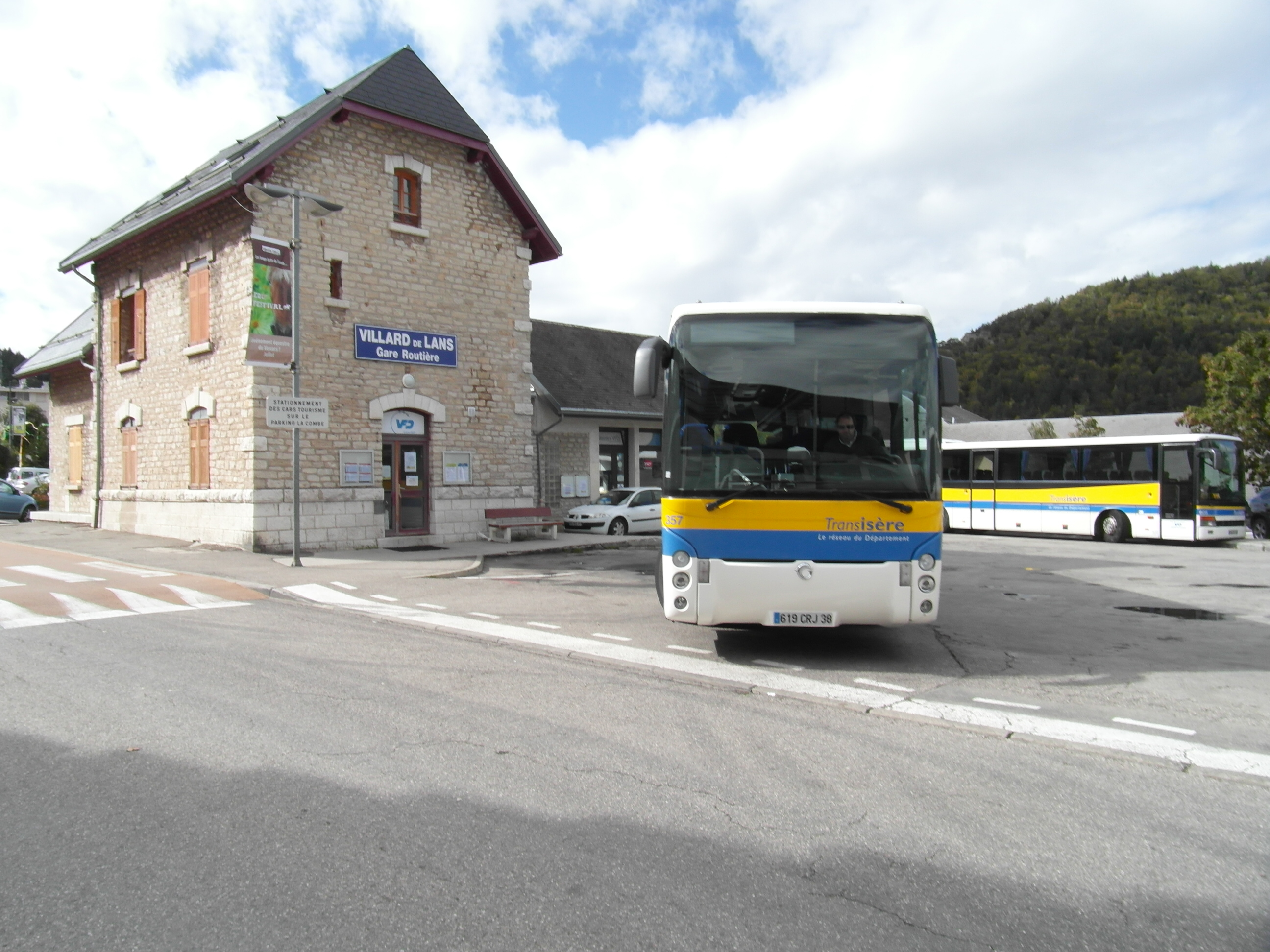 Autocar des Transisère à Villard-de-Lans